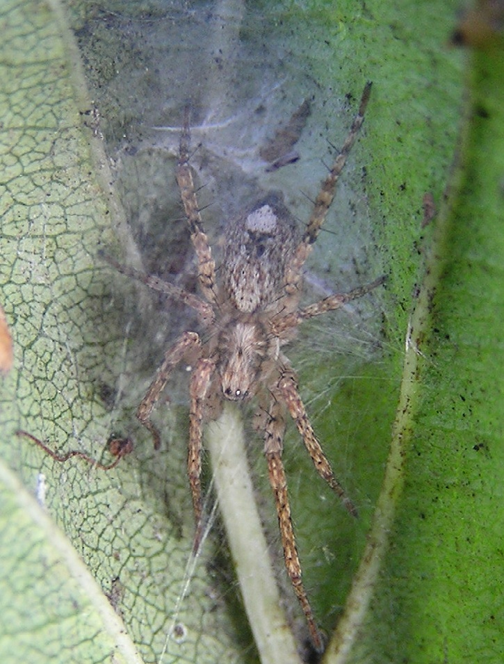 Anyphaena accentuata auf der Unterseite eines Weidenblattes bei Neuss (Deutschland).